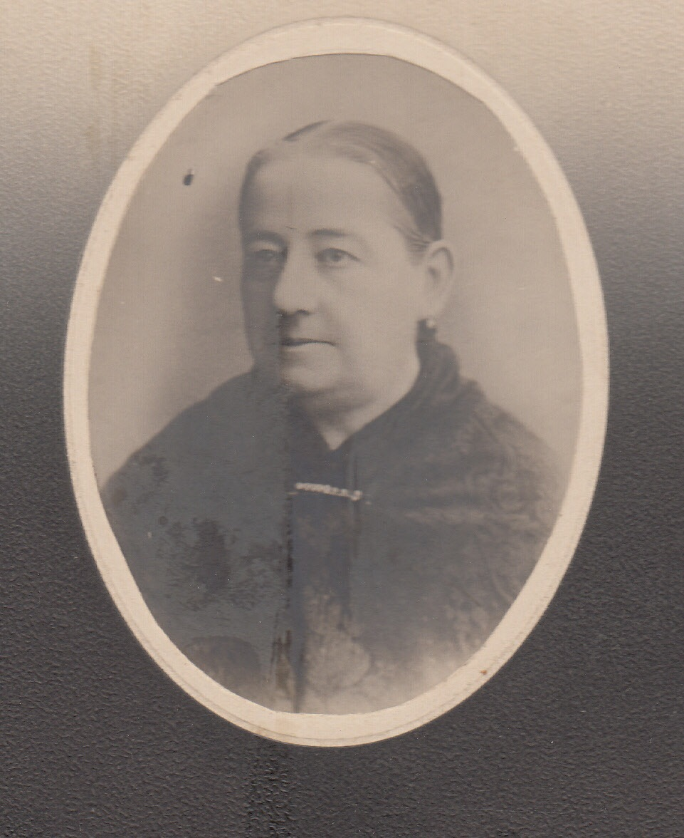 Natalia Vargas Rencoret (Talca, 1823- Santiago de Chile, 19 de junio de 1900). Ella es la suegra de Diego Vergara Correa. Fotografía capturada en el año de 1880 en Santiago de Chile.